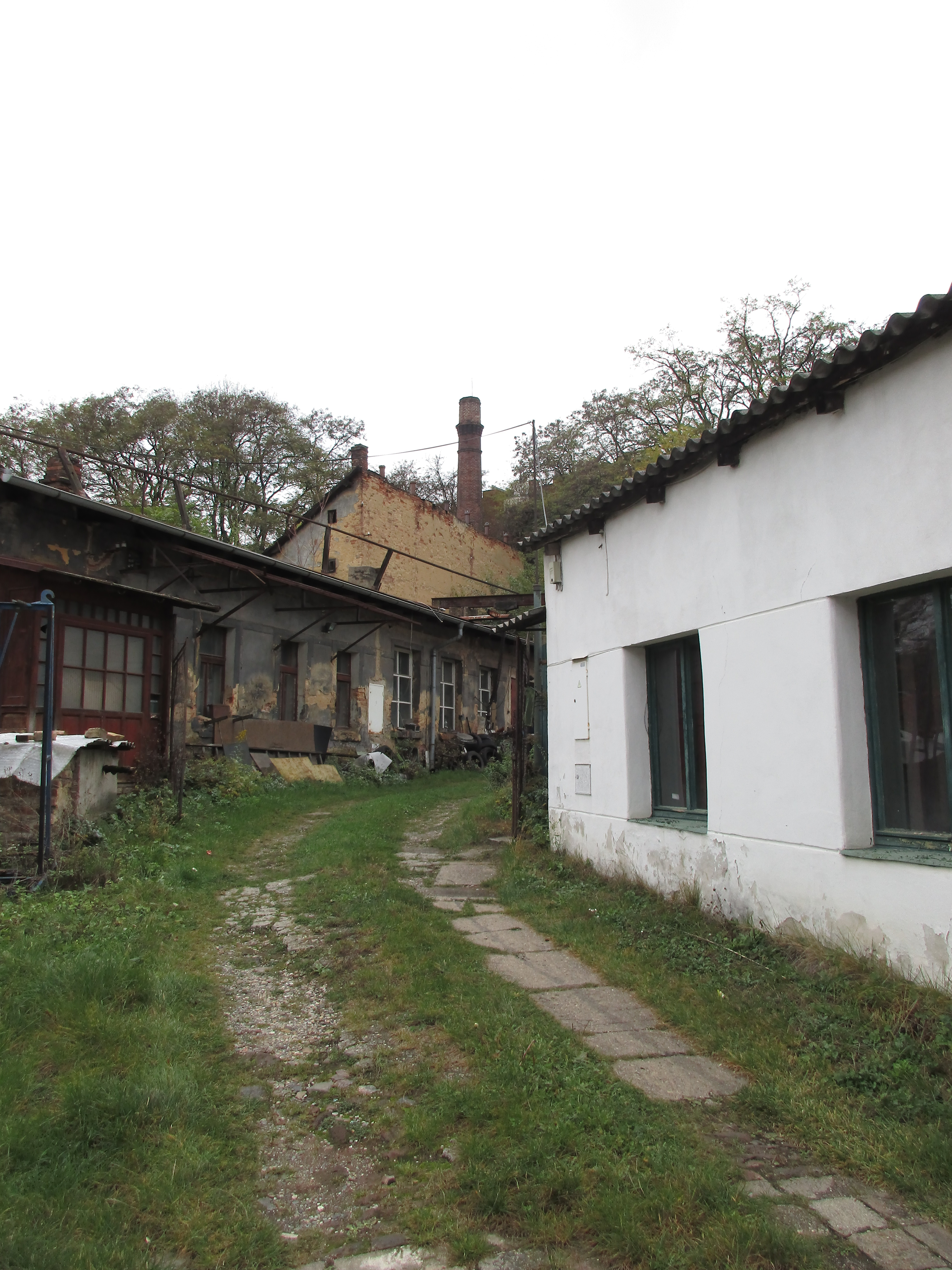 Komín bývalého Hubínkova lihovaru v horní Libni.